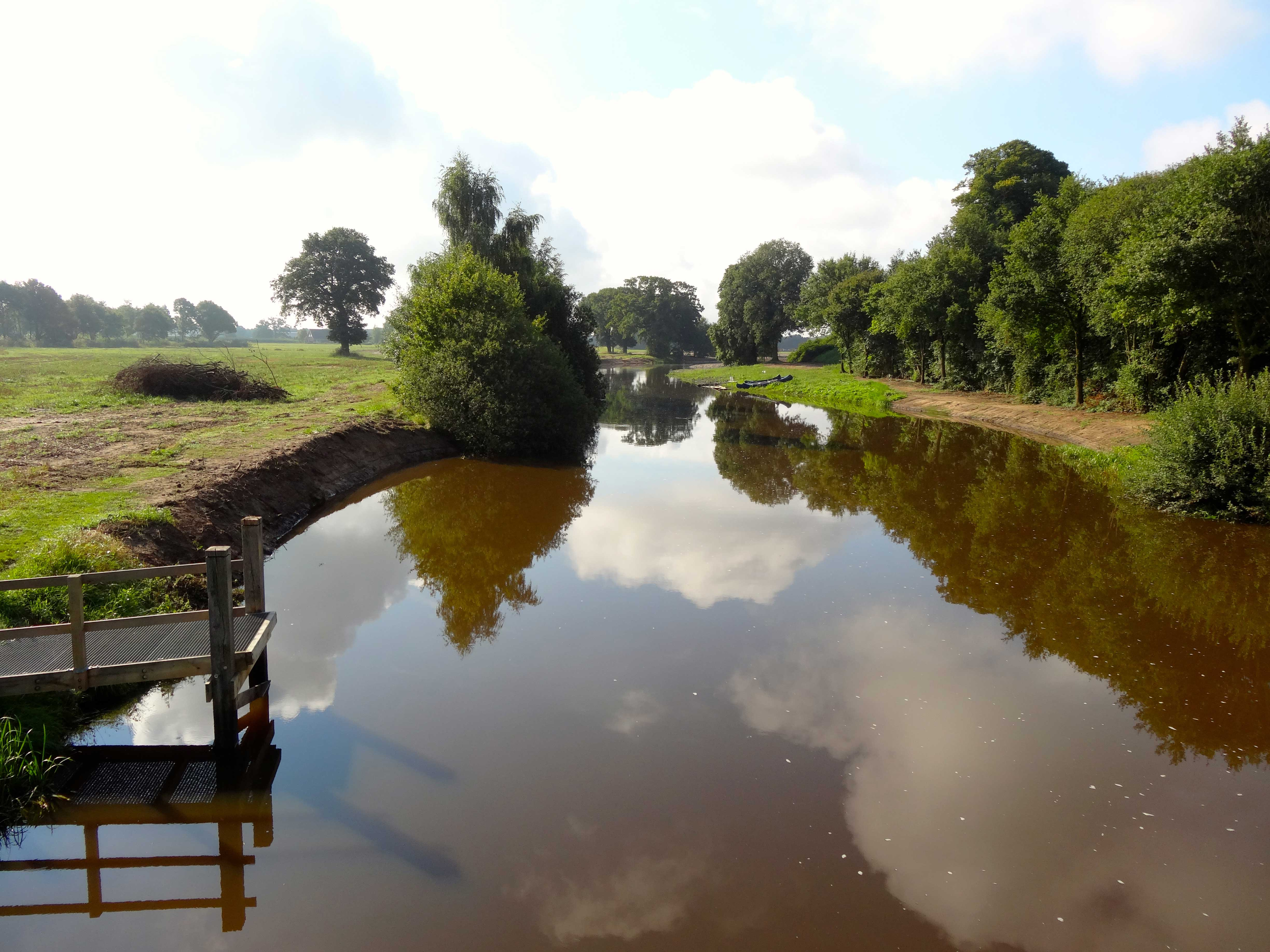 De Midden-Regge bij Schuilenburg